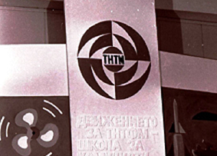 Изложба на ТНТМ.